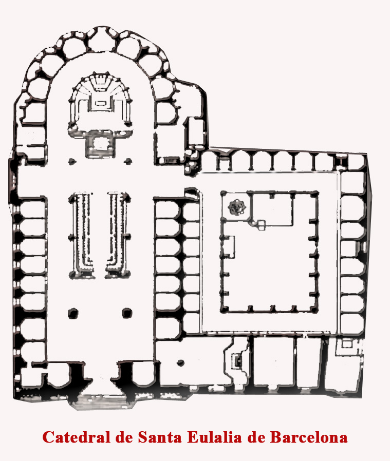 La Catedral de la Santa Cruz y Santa Eulalia (también llamada, en lugar de catedral, Seo, o Seu en catalán) es la catedral gótica de Barcelona, sede del arzobispado de Barcelona de España.